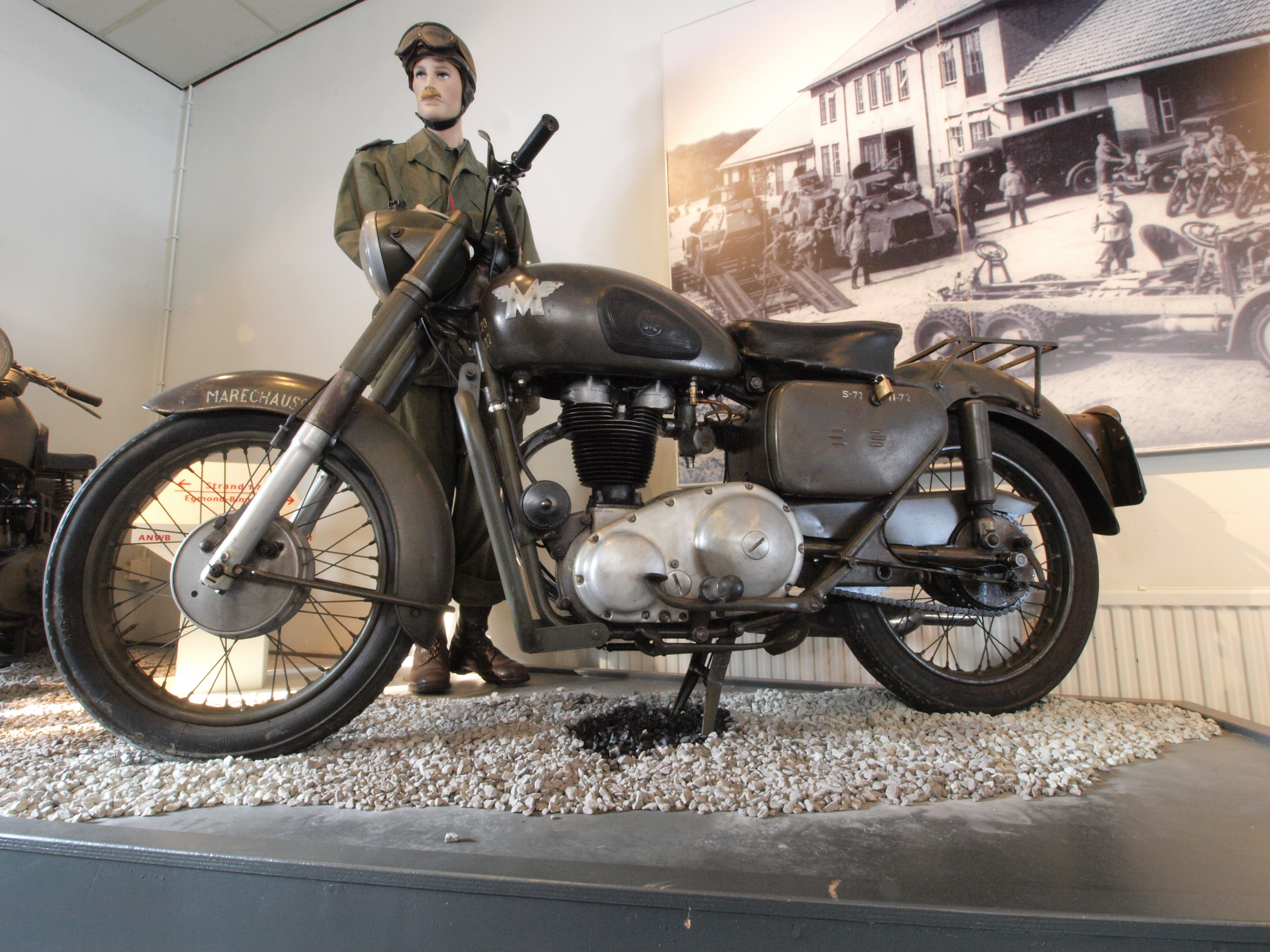 Matchless G3L